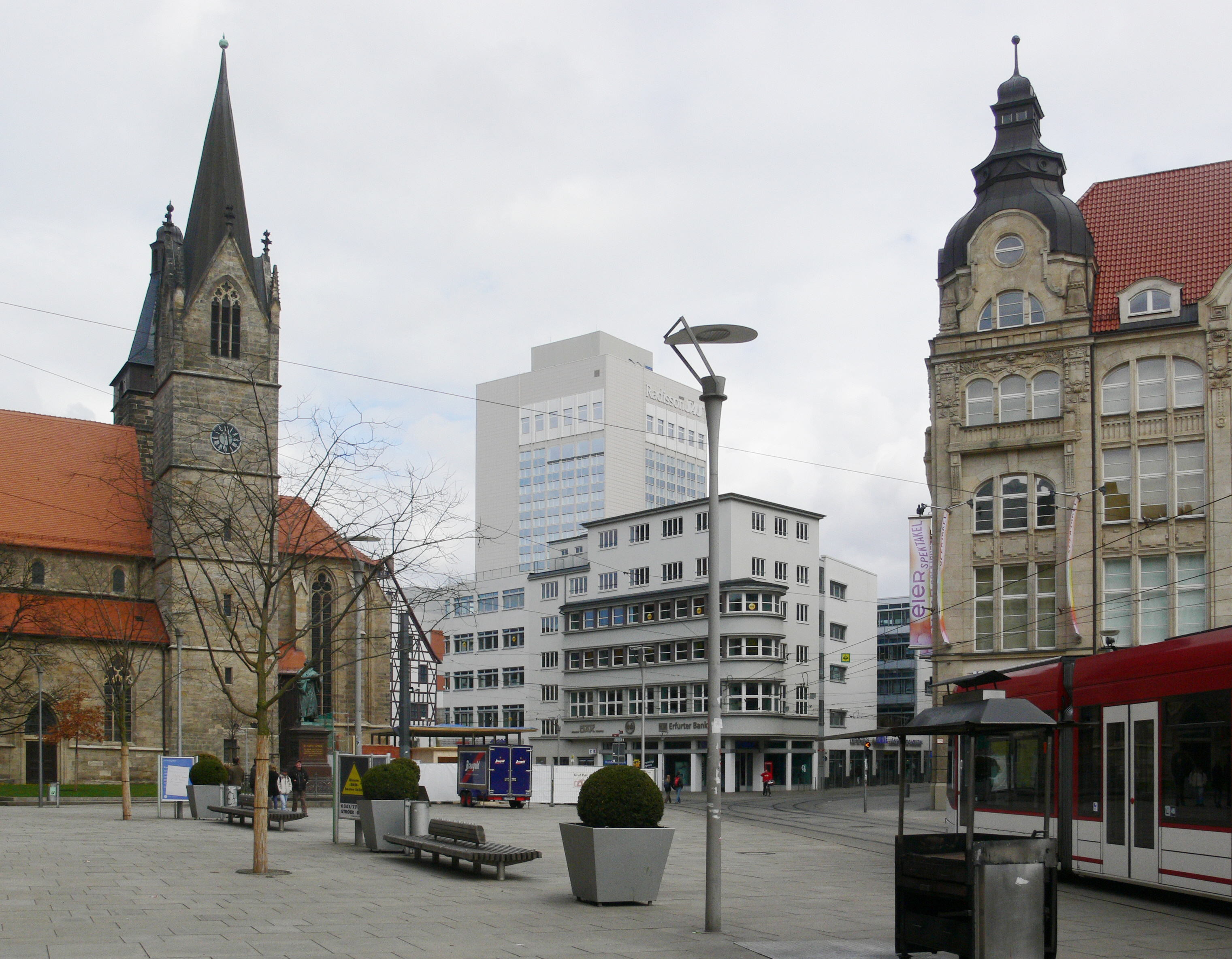 Erfurt, Anger mit (von links nach rechts) Kaufmannskirche, Haus Johannesstraße 182 und Kaufhaus Anger 1